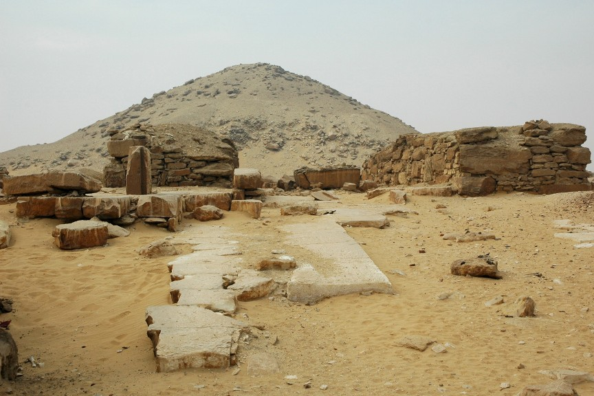 Zugang zum Totentempel mit Überresten der "Pylone"/ turmartigen Gebäuden und dahinter Pyramide des Djedkare-Isesi, späte 5. Dynastie, ca. 2400 v. Chr., Saqqara-Süd